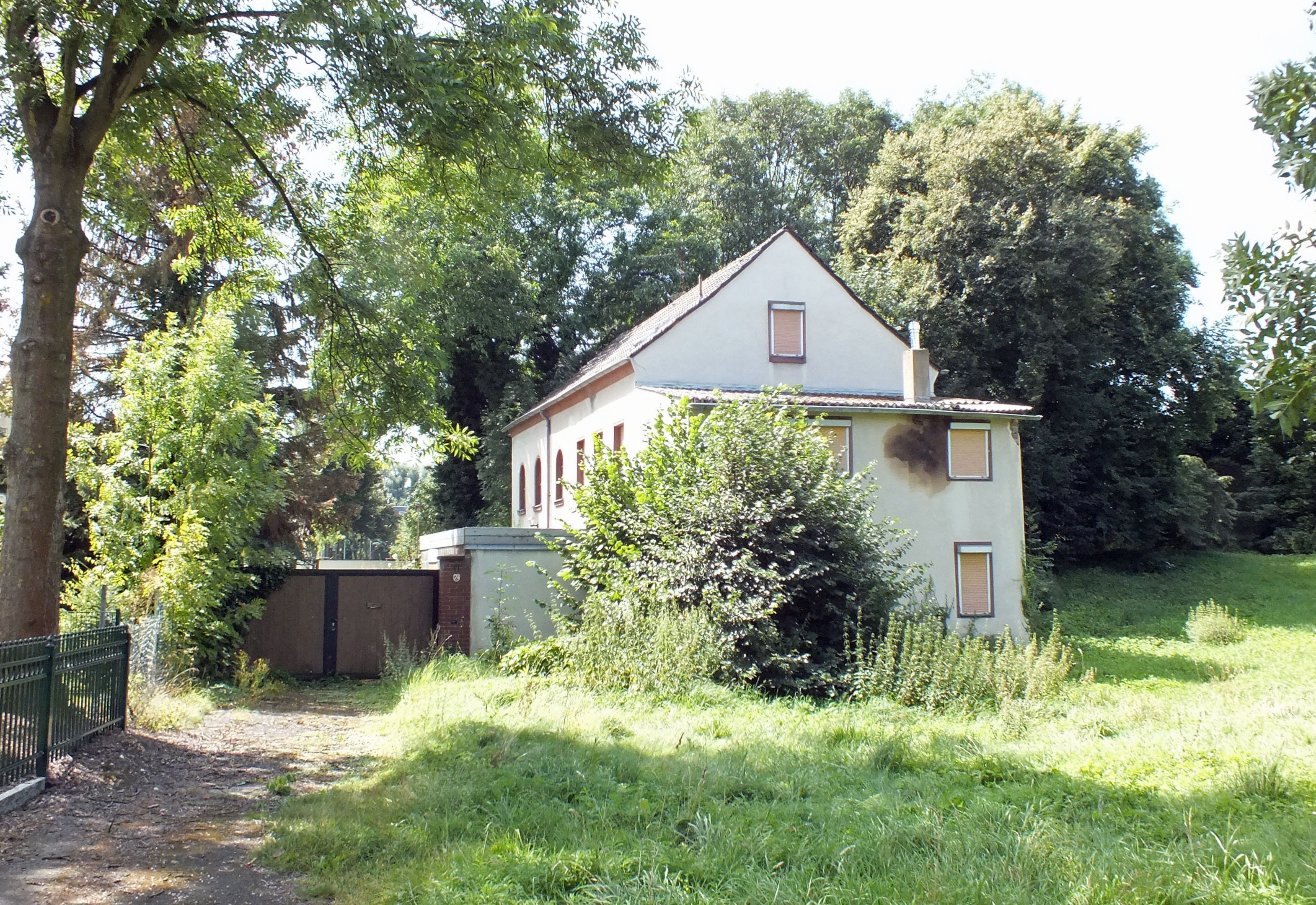 ehemalige Wassermühle HeiderhofThis is a photograph of an architectural monument., no. I/066